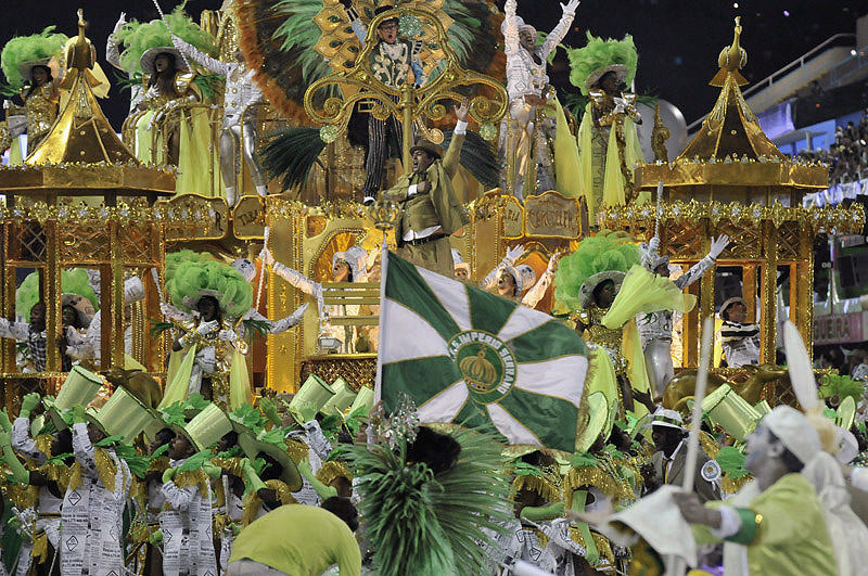 Desfile de 2010 do Império Serrano. Foto: Ricardo Almeida.